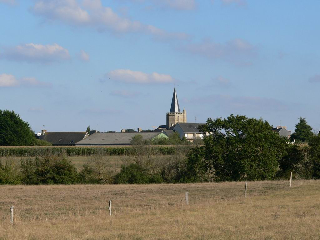 Hillion, Clocher de l'église